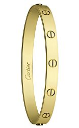 CARTIER BRACELET